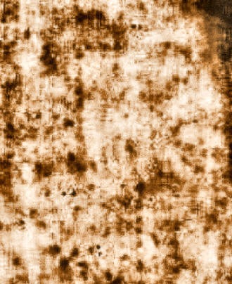 Florale Motive (angeblich Pflanzenabdrücke) auf dem Turiner Grabtuch, auf diesem Bild erkannt von dem Psychiater Alan Whanger (A. Whanger: Polarized Image Overlay Technique. A New Image Comparision Method and Its Applications. In: Applied Optics 24 (1985), Nr. 6 (15. März 1985), S. 766–772).